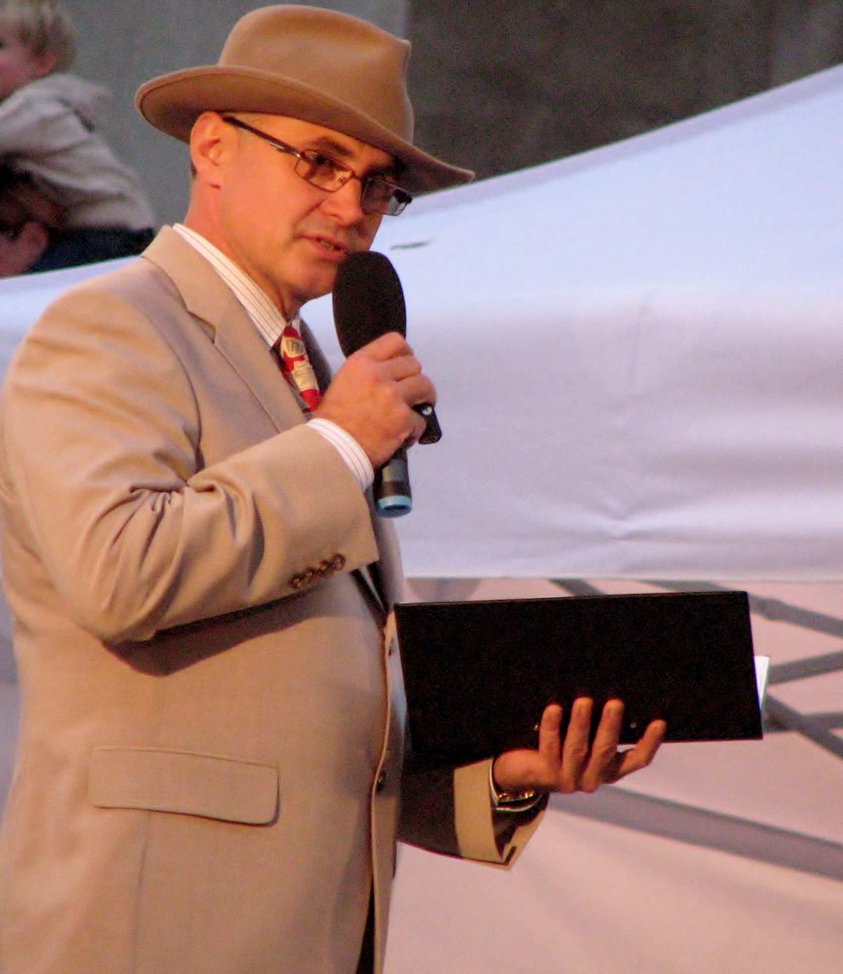 Raivo Põldmaa esinemas Tallinna Linnateatri 48. hooaja avamisel